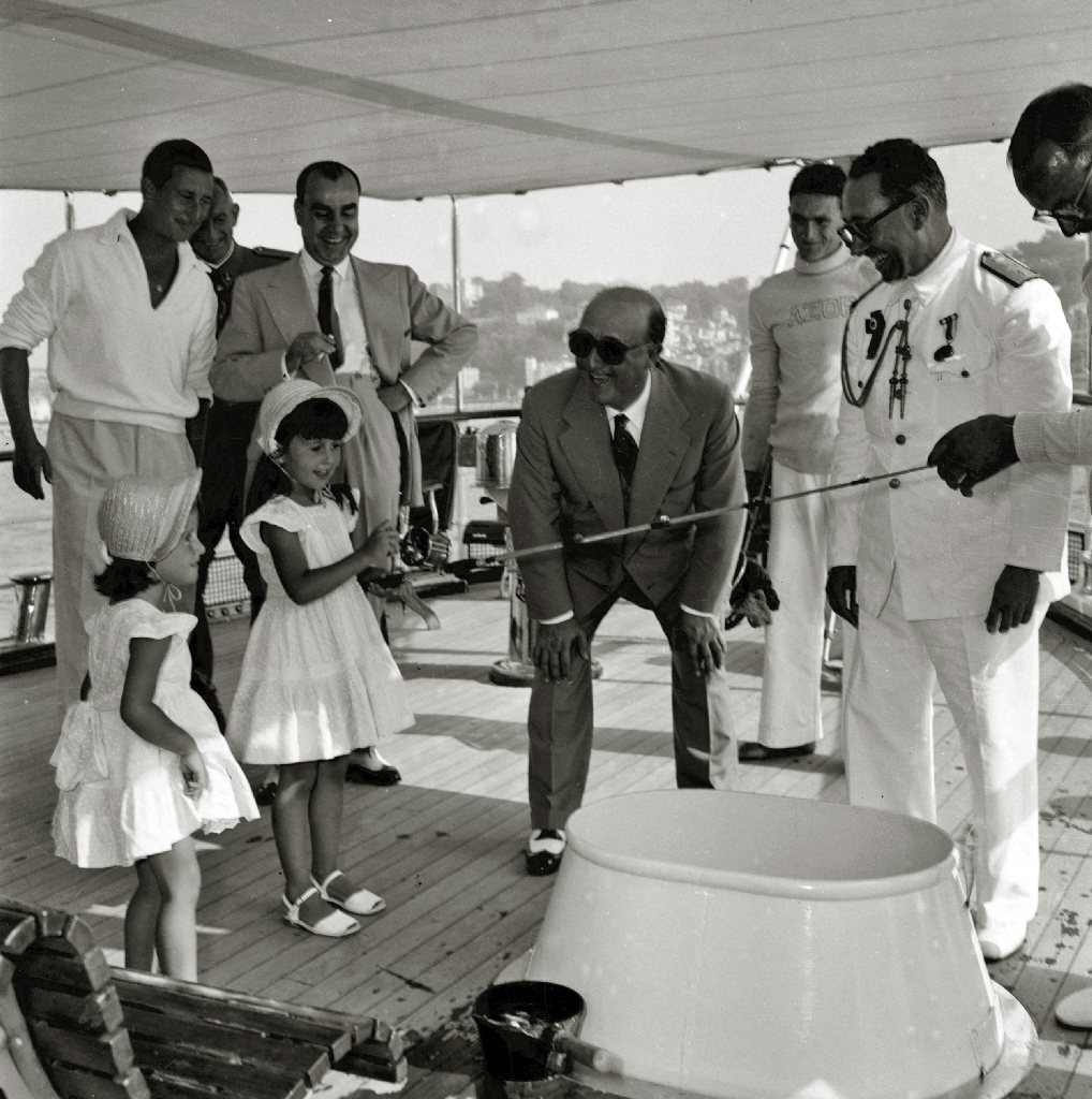 Título original: Franco y sus nietos en el Azor (4/4) Localización: Guipúzcoa